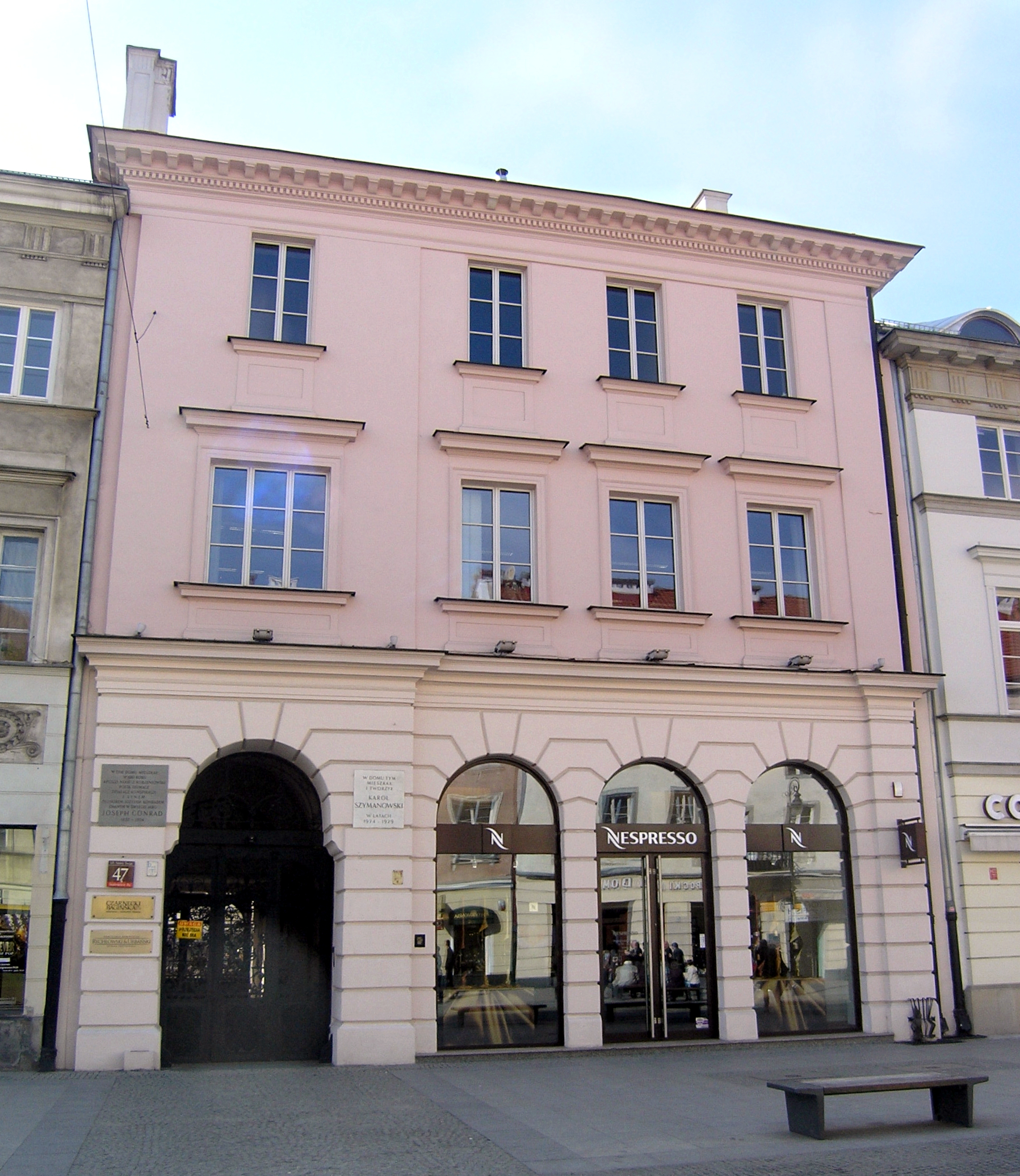 W kamienicy tej w roku 1861 mieszkali pisarze Apollo Korzeniowski i jego syn Józef Konrad Korzeniowski (Josepha Conrada), a w latach 1924-1929 kompozytor Karol Szymanowski